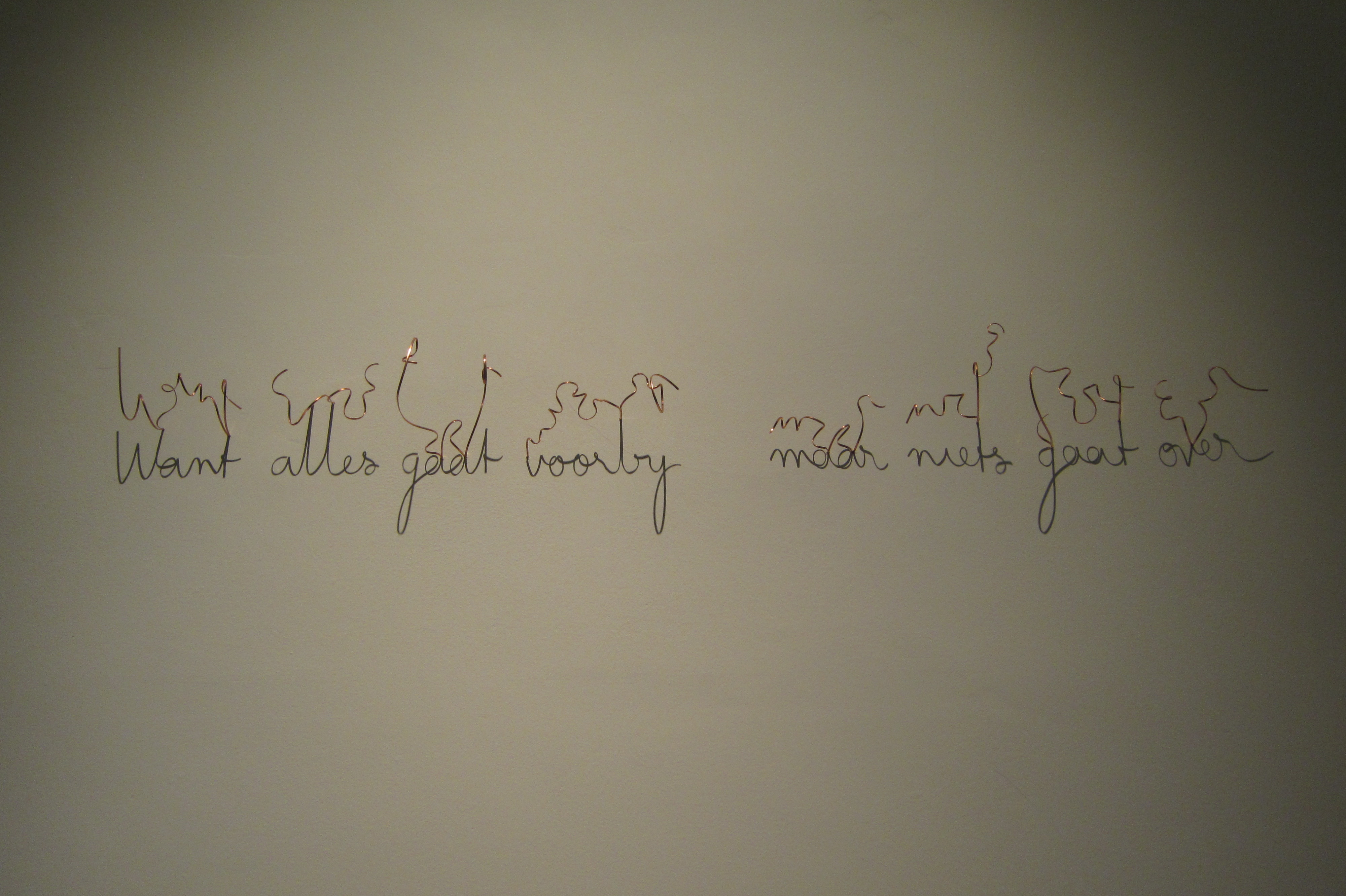 Fred Eerdekens, Want alles gaat voorbij maar niets gaat over, in het Stadsmuseum Hasselt (Belgisch-Limburg]